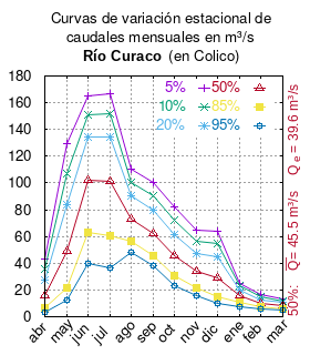 Curvas de variación estacional del río Curaco en Colico. # Dirección General de Aguas # Diagnóstico y clasificación de los cursos y cuerpos de agua según objetivos de calidad. Cuenca del río Toltén. # Santiago de Chile # Ministerio de Obras Públicas (Chile) # 2004 # url: # urlarchivo: # Tabla 4.2: Río Curaco en Colico (m3/s) pág. 40 mes 5% 10% 20% 50% 85% 95% abr 43.42 35.79 27.76 15.86 6.70 3.59 may 129.05 107.14 83.97 49.26 21.85 12.22 jun 165.05 151.22 134.45 102.42 62.96 39.78 jul 166.47 152.10 134.70 101.44 60.48 36.42 ago 110.00 100.47 90.04 73.01 56.40 48.46 sep 100.54 90.39 79.45 62.09 45.83 38.35 oct 81.92 72.19 61.77 45.41 30.32 23.47 nov 65.09 56.42 47.38 33.72 21.59 16.08 dic 63.98 54.63 44.55 28.78 15.18 9.76 ene 25.22 22.92 20.26 15.57 10.40 7.65 feb 16.39 14.63 12.75 9.81 7.10 5.87 mar 13.27 11.90 10.42 8.09 5.92 4.93 This plot was created with Gnuplot.